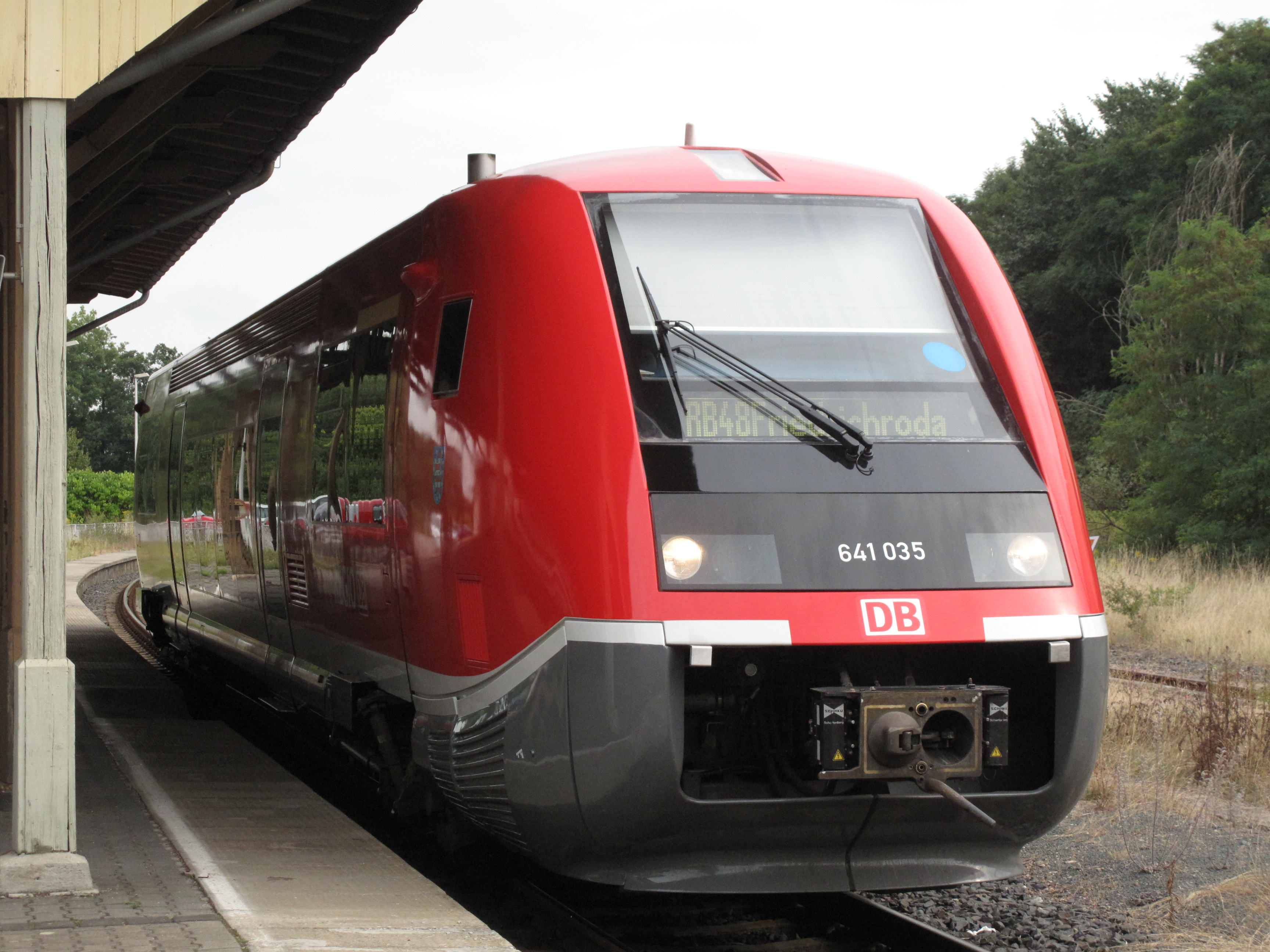 641 035 in Fröttstädt